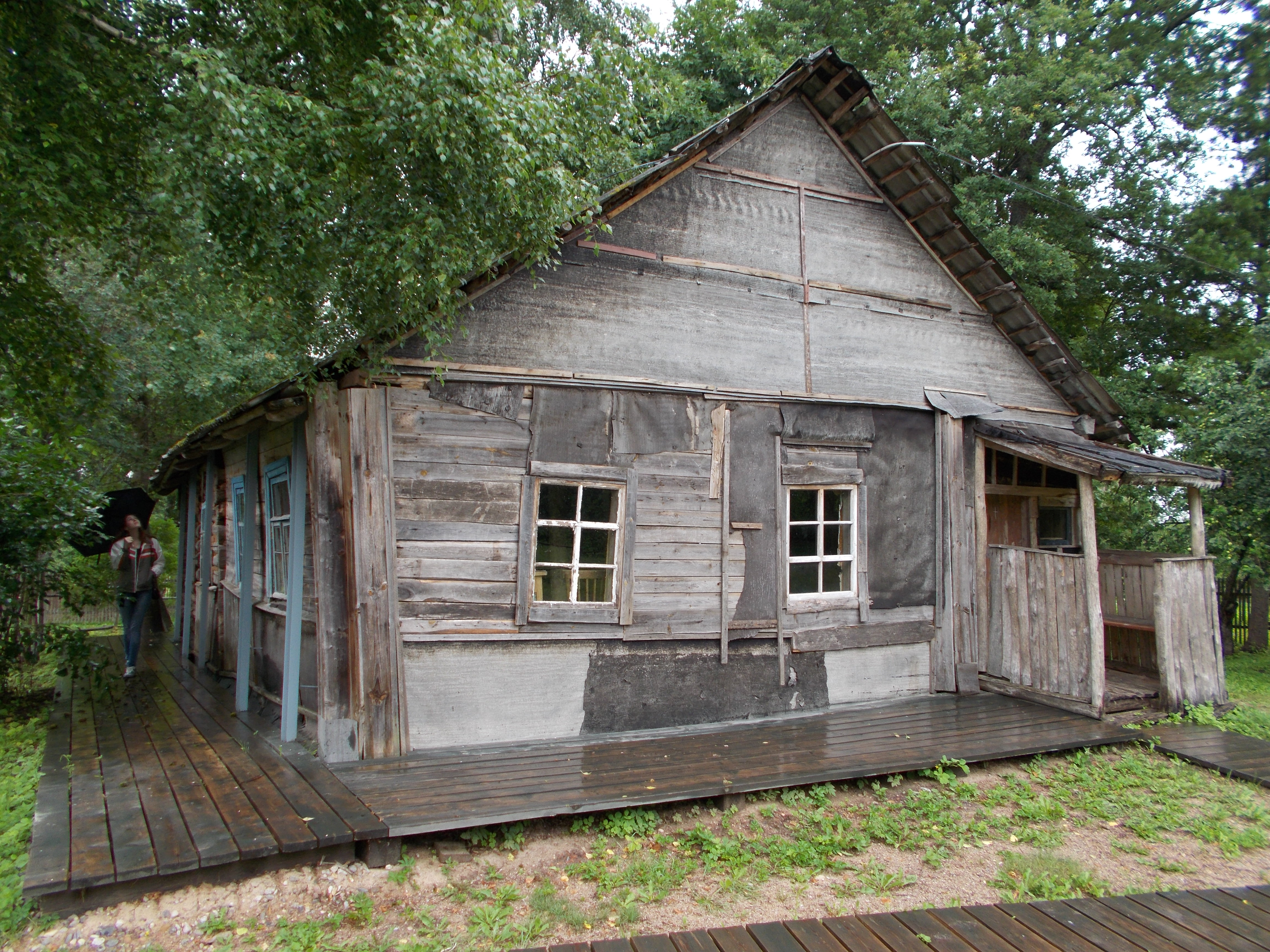 Дом в деревне Березино, в котором жил Сергей Довлатов во время работы экскурсоводом в Пушкинском заповеднике под Псковом (Михайловское).